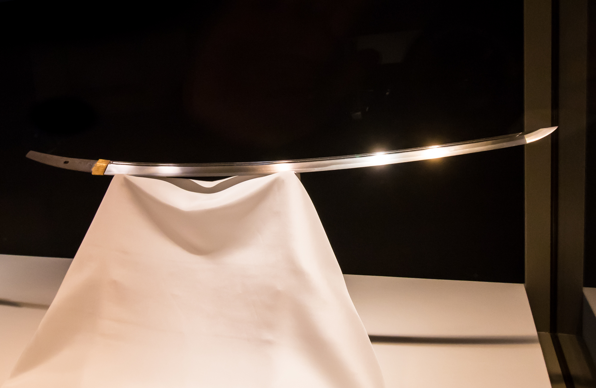 太刀。青江守次、銘「備中国住守次作 延文二年十二月日」（重要文化財）、南北朝時代（1357）。